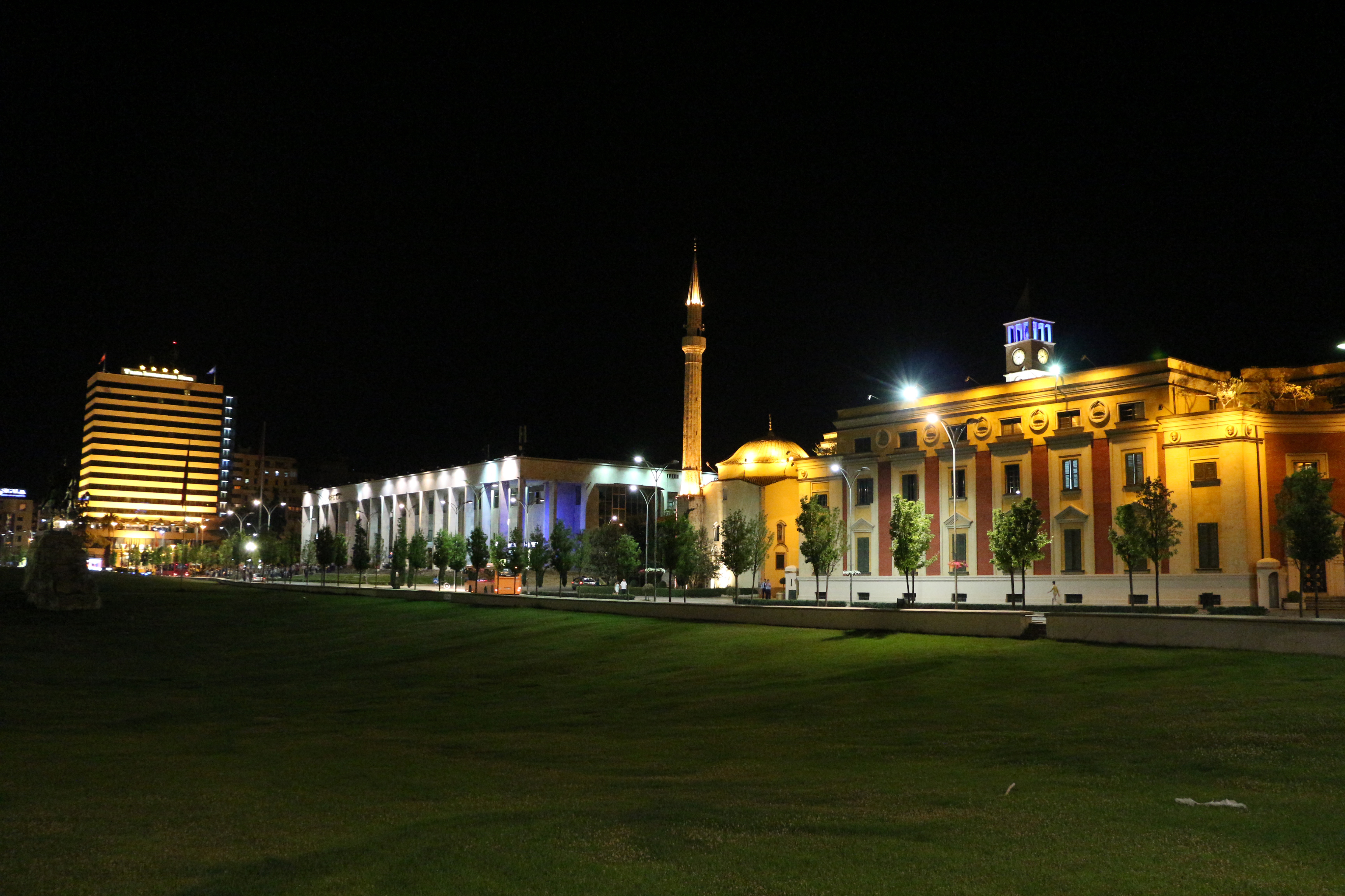 Aksi Kryesor Dhe Qendra Historike e Tiranës